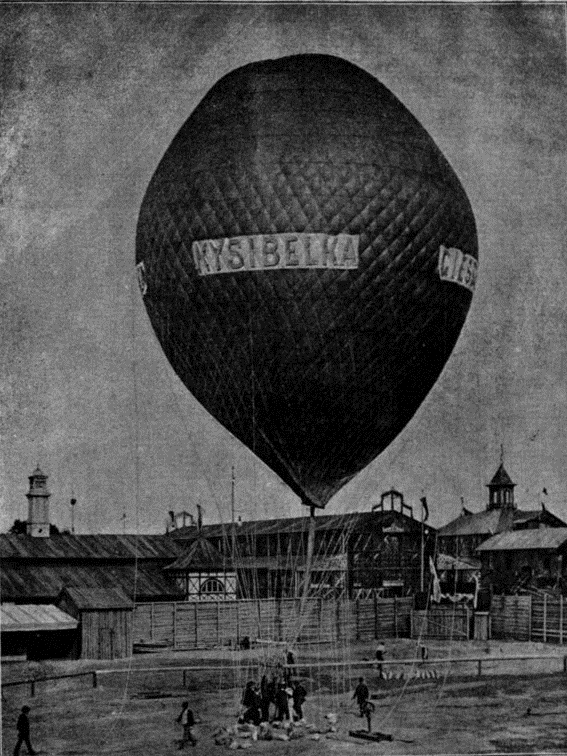 Upoutaný balón Kysibelka na Jubilejní výstavě v Praze roku 1891